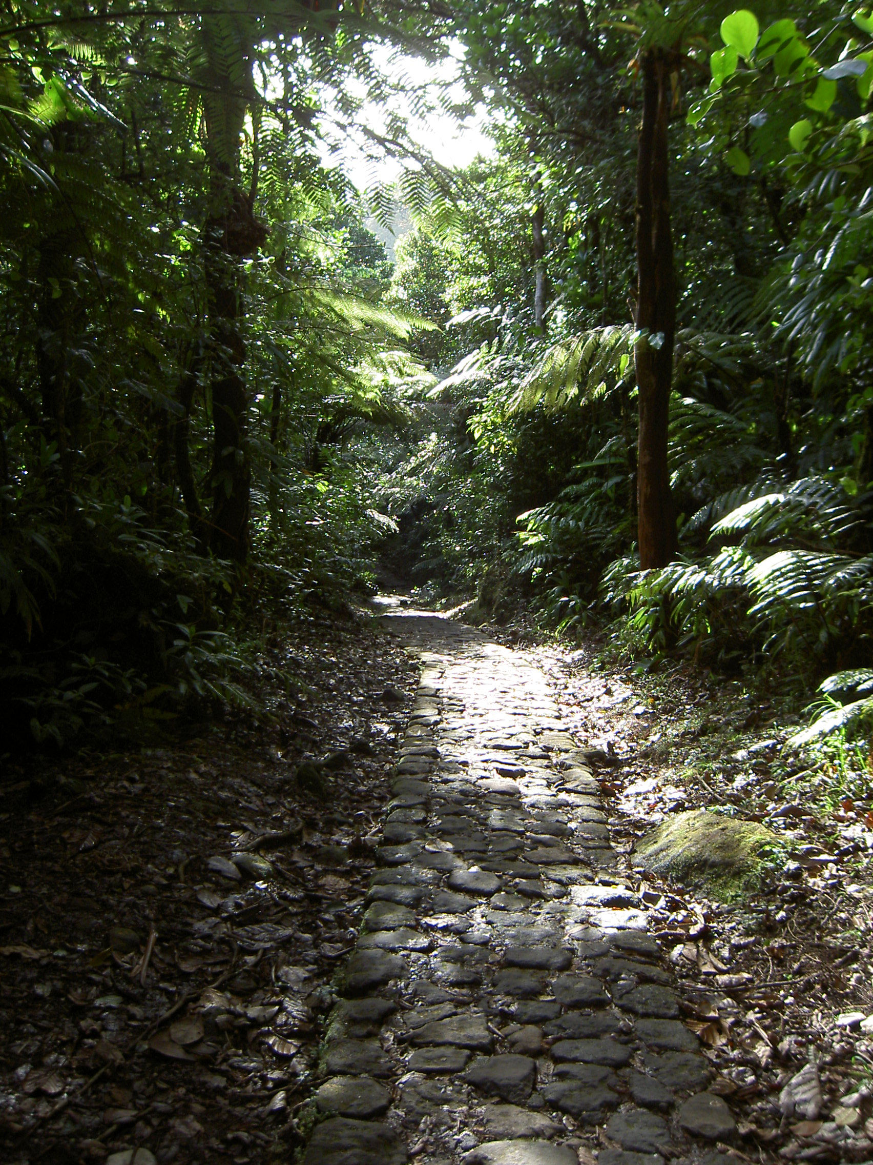 Guadeloupe - Massif de la Soufrière - Chemin des bains jaunes Guadeloupe - Soufriere massif (an active volcano - Yellow bath road